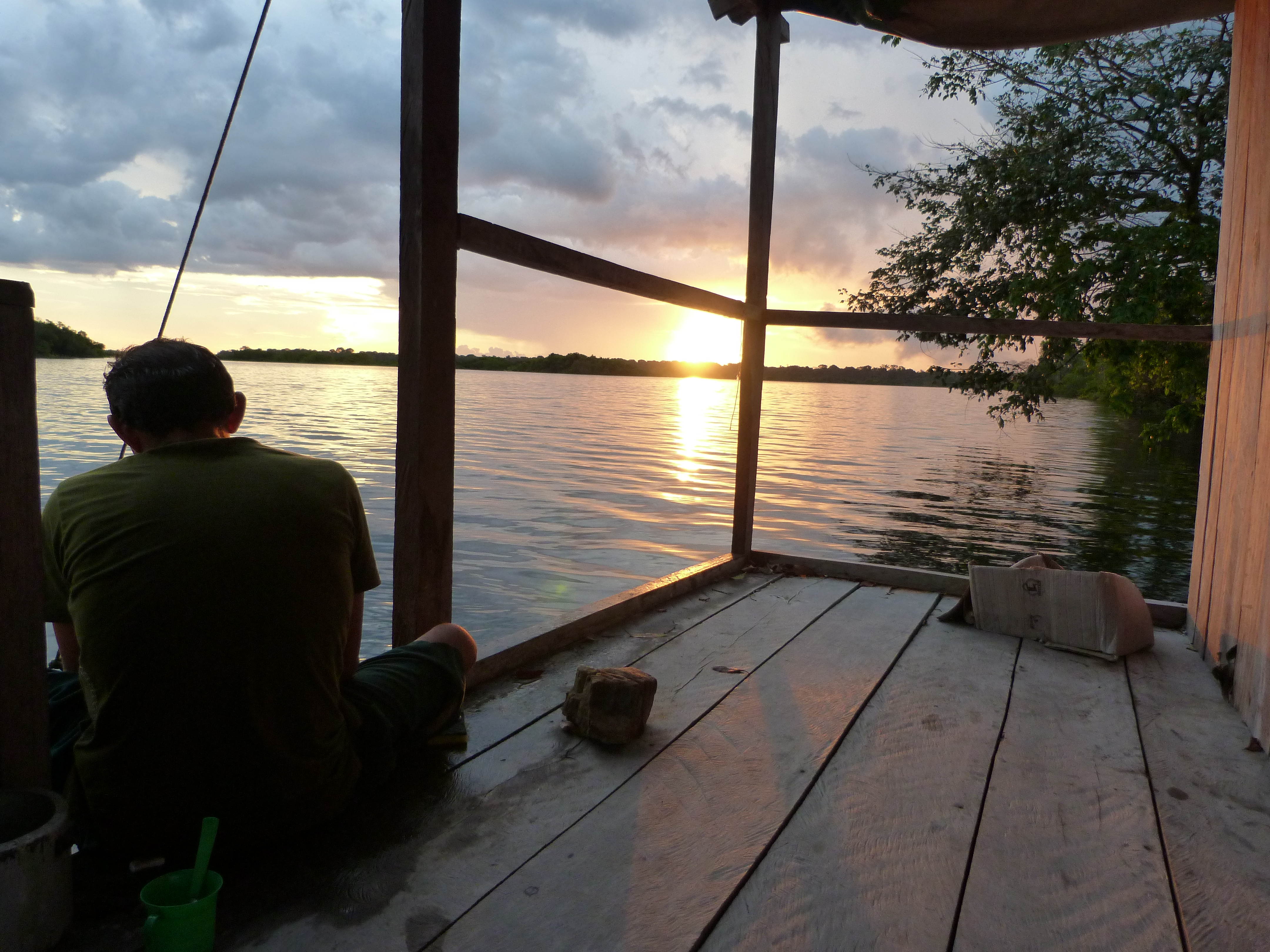 Ribeirinho no flutuante